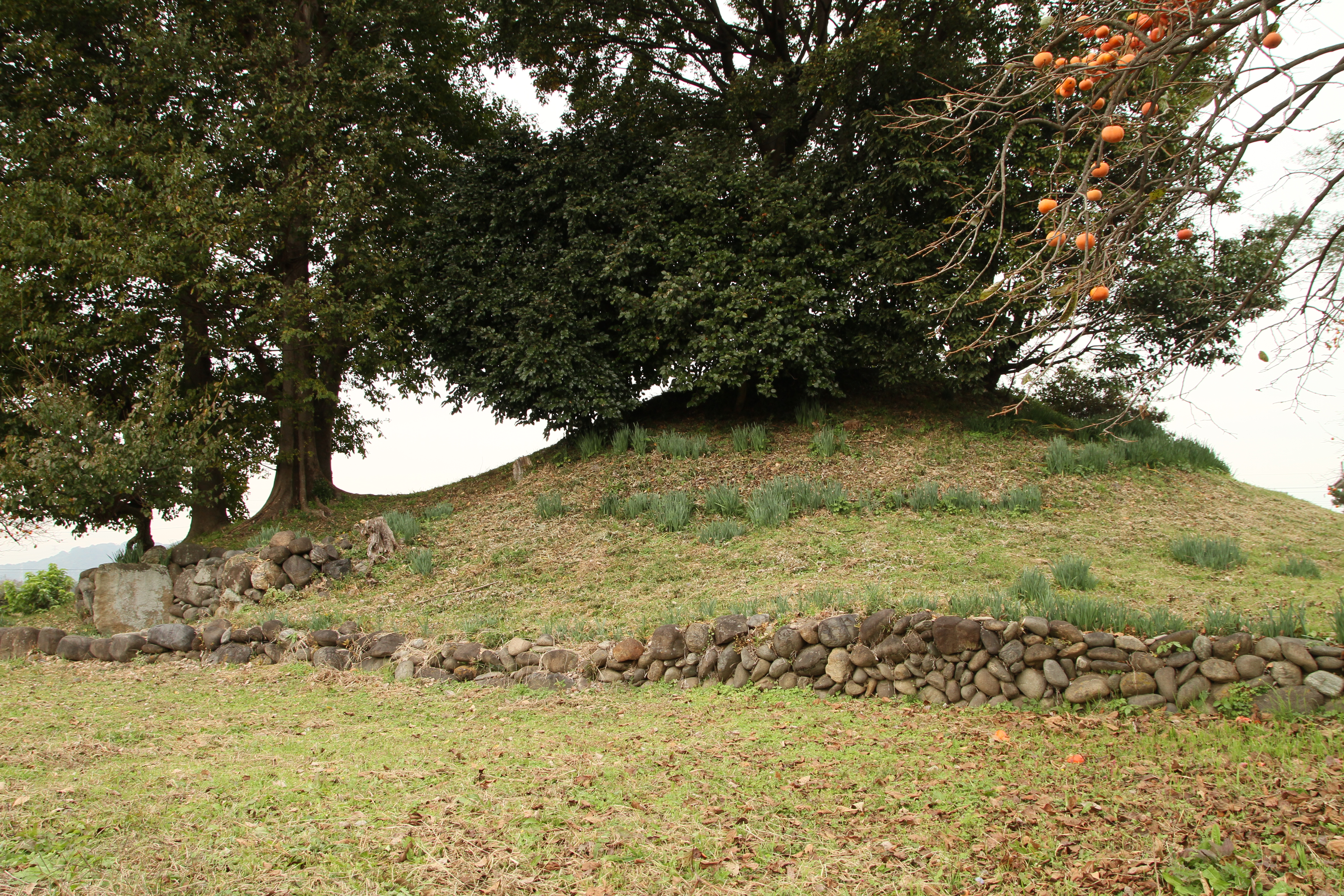 伊勢塚古墳（藤岡市）